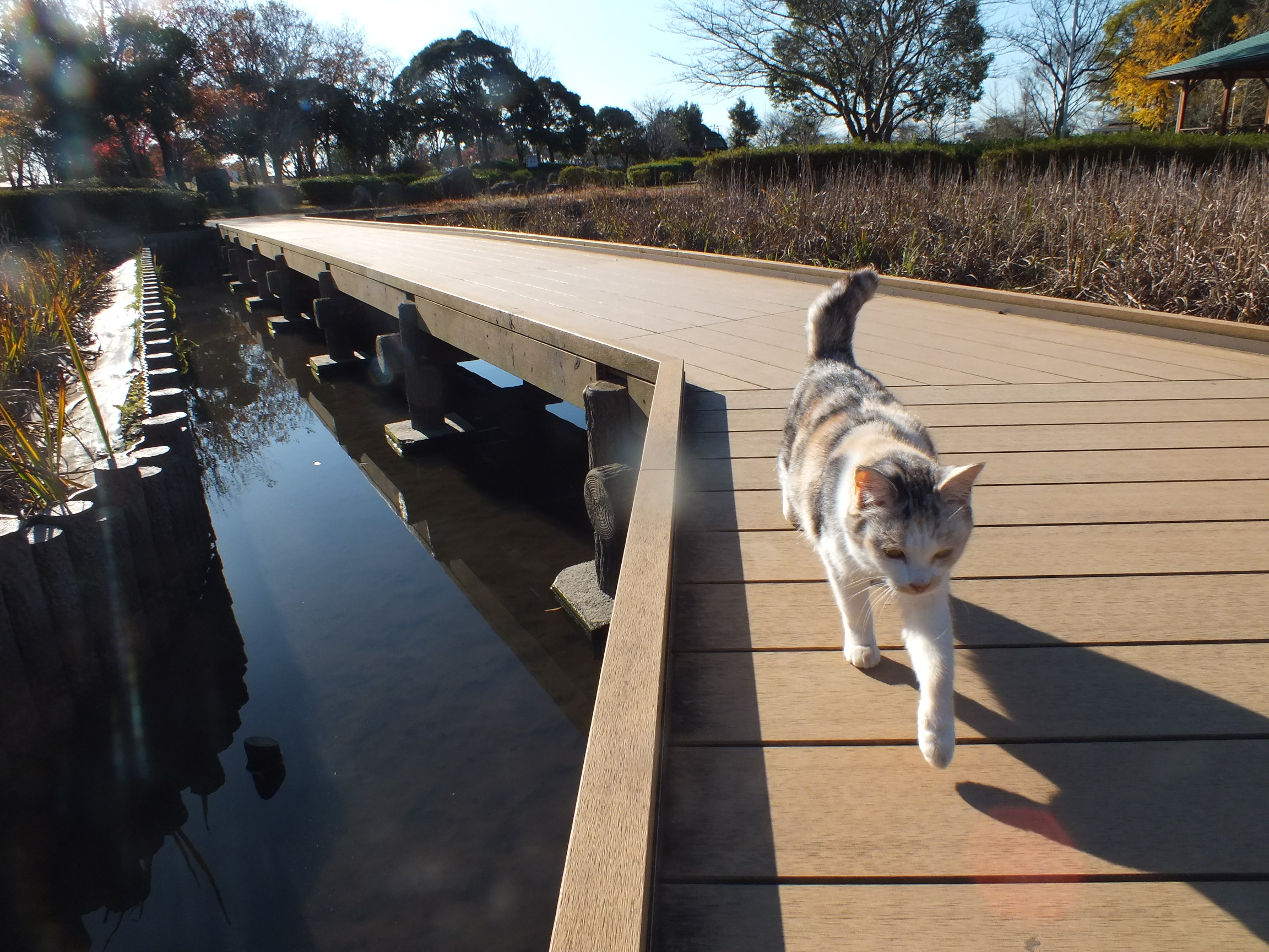 入園 無料 開園時間 常時開設 管理事務所 ８：３０～１７：００ 電話：0438-63-6560 住所 千葉県袖ケ浦市飯富２３６０